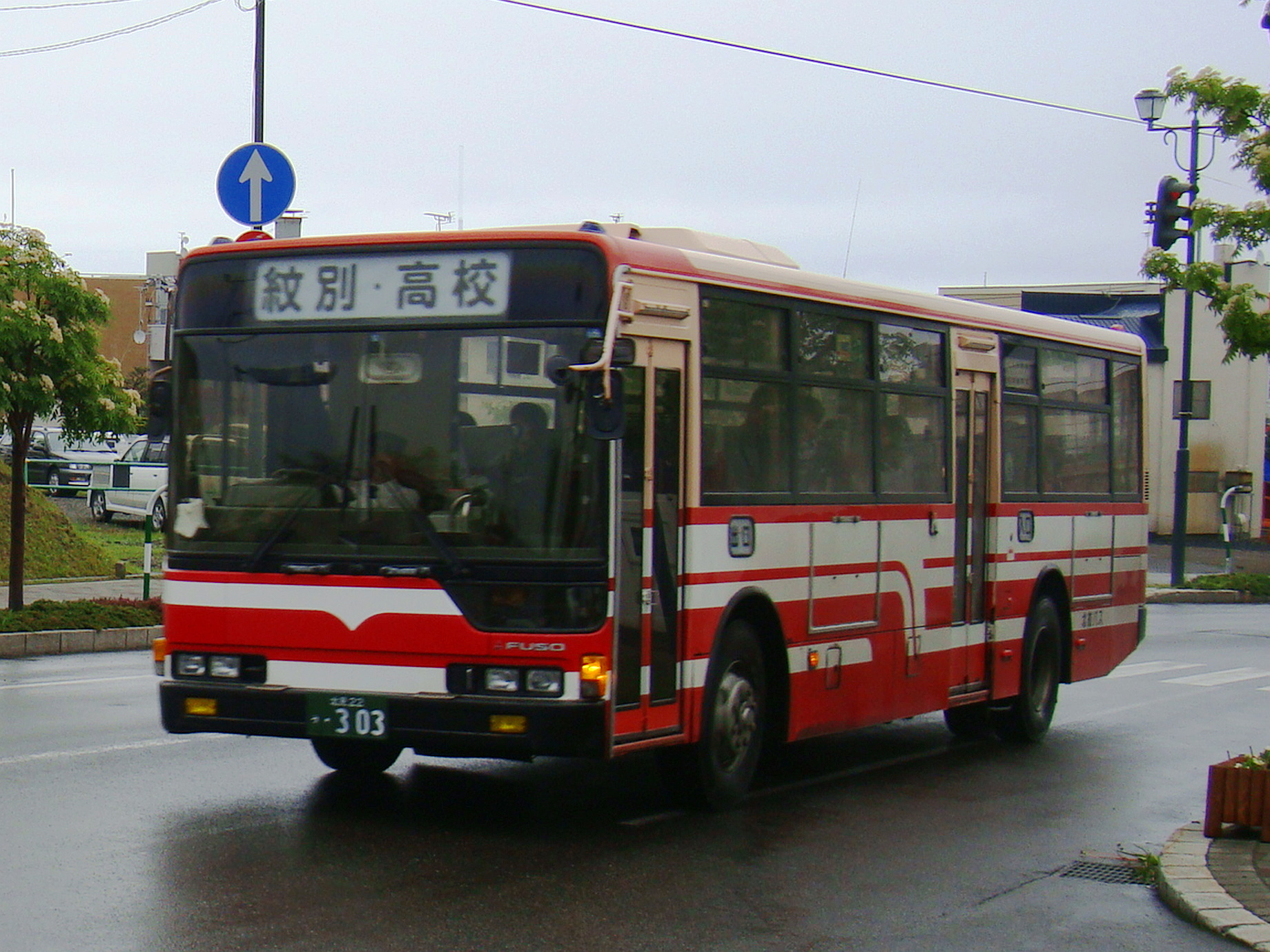 Ōmu to Monbetsu